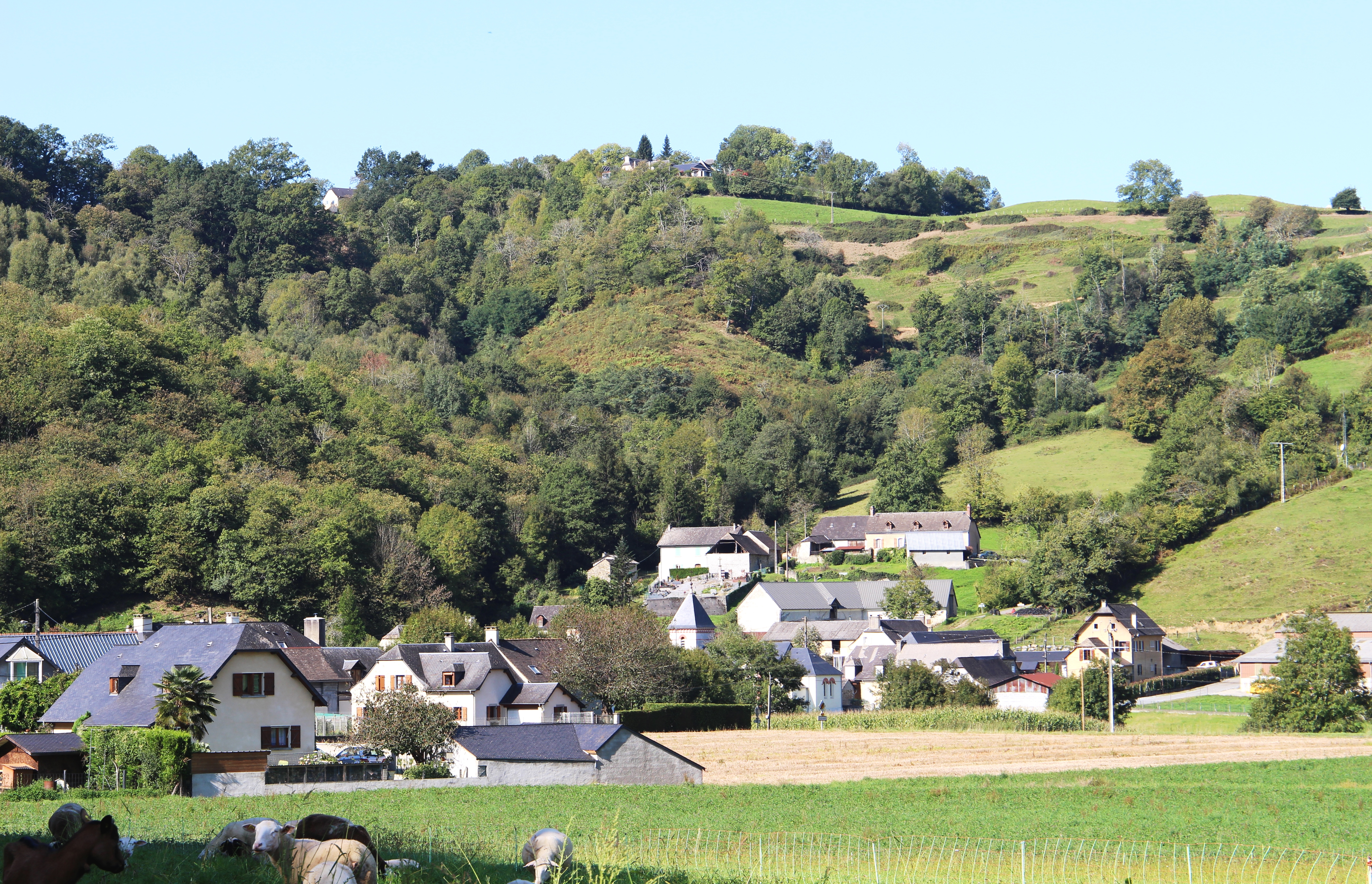 Escoubès-Pouts (Hautes-Pyrénées)